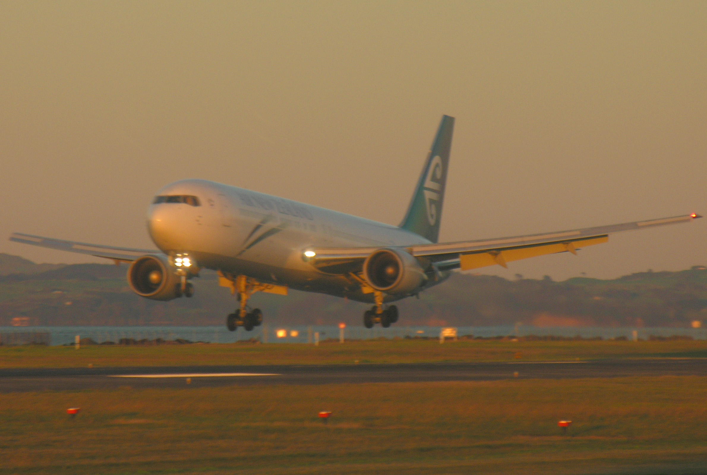 ANZ